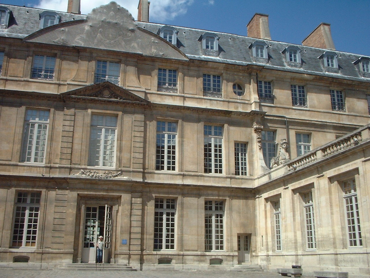 Photo du musée Picasso de Paris coté cour